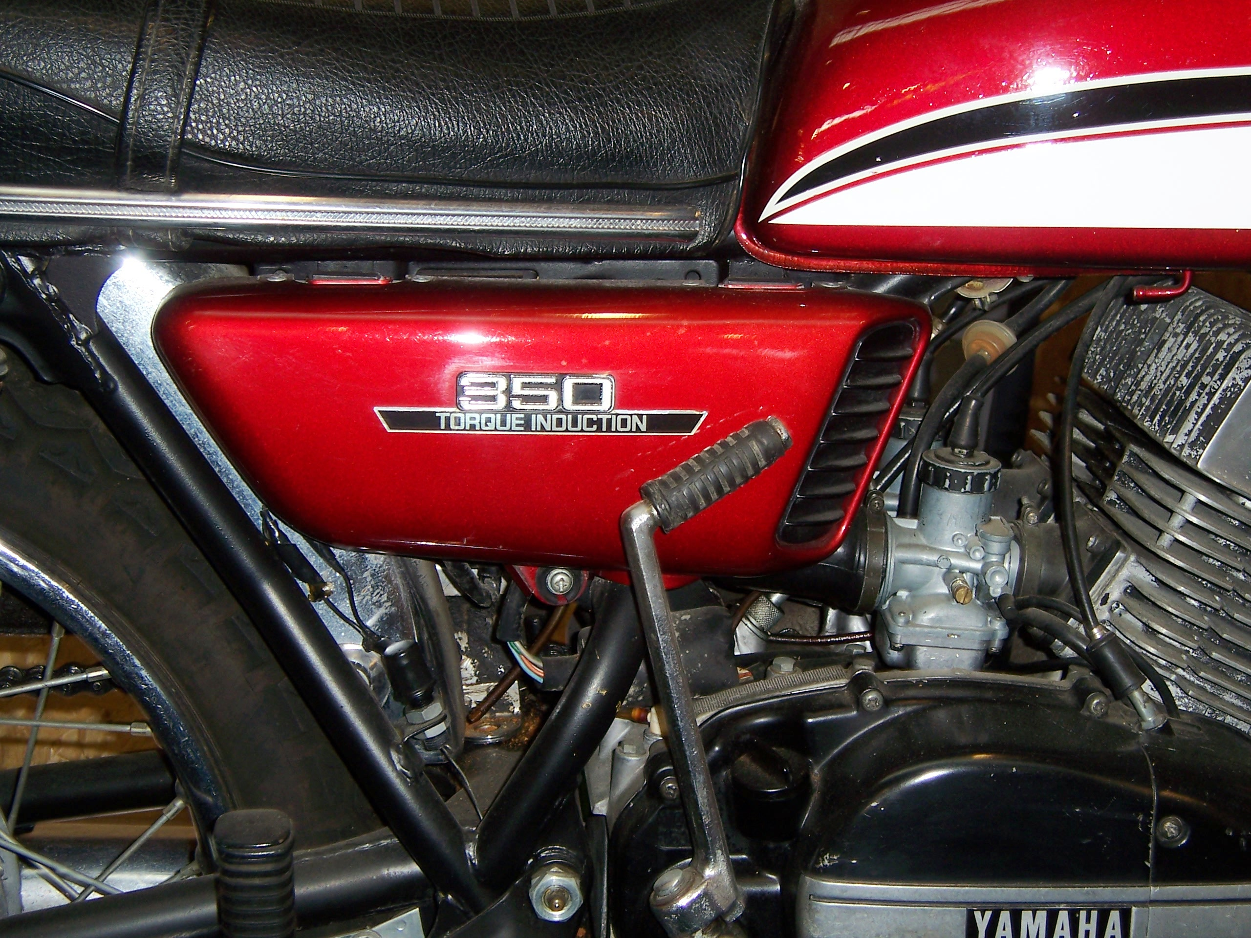 Yamaha RD 350, Detail rechte Seite